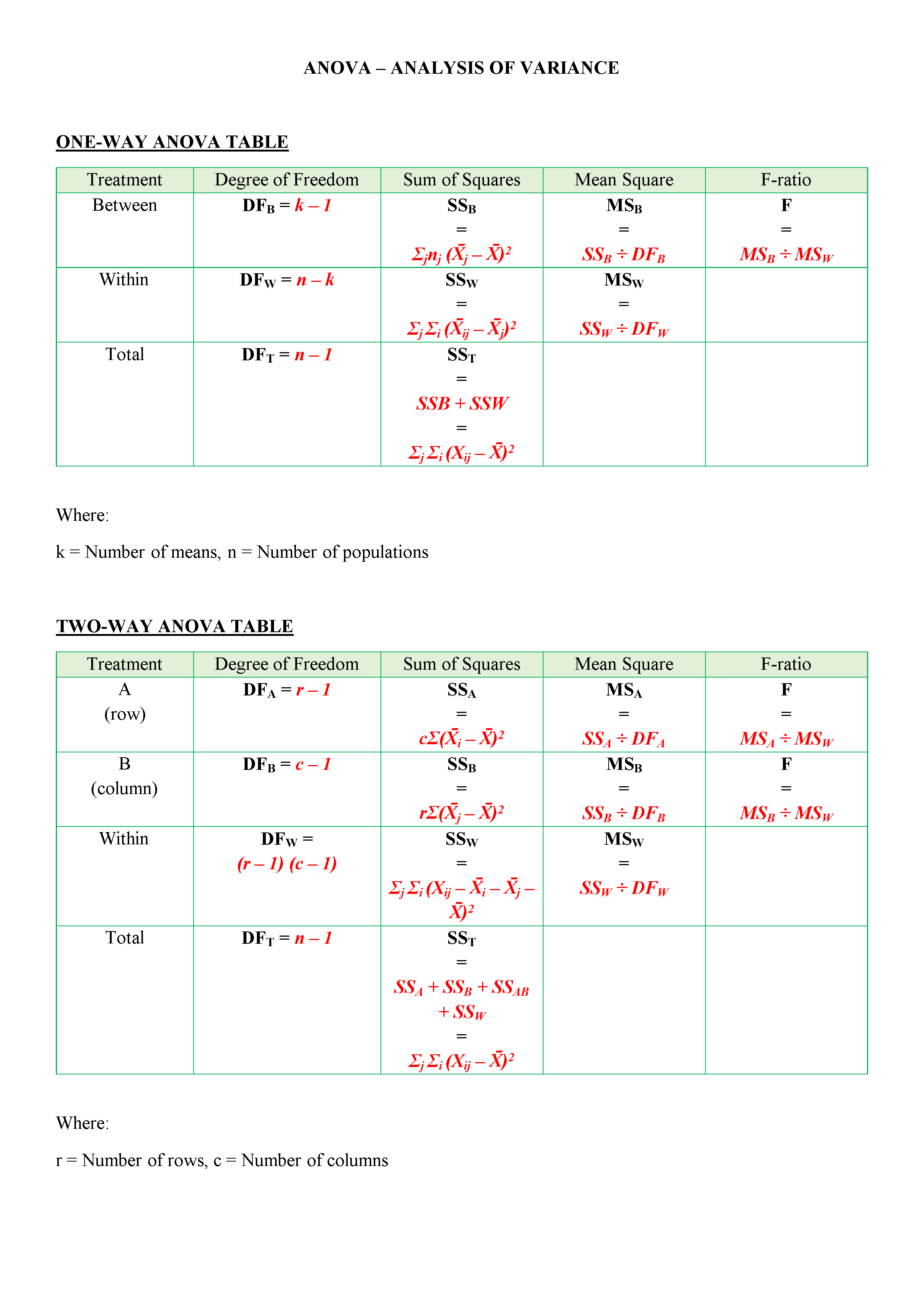 မြန်မာဘာသာ: ANOVA ပုံမှန်တွက်ချက်နည်းဇယား